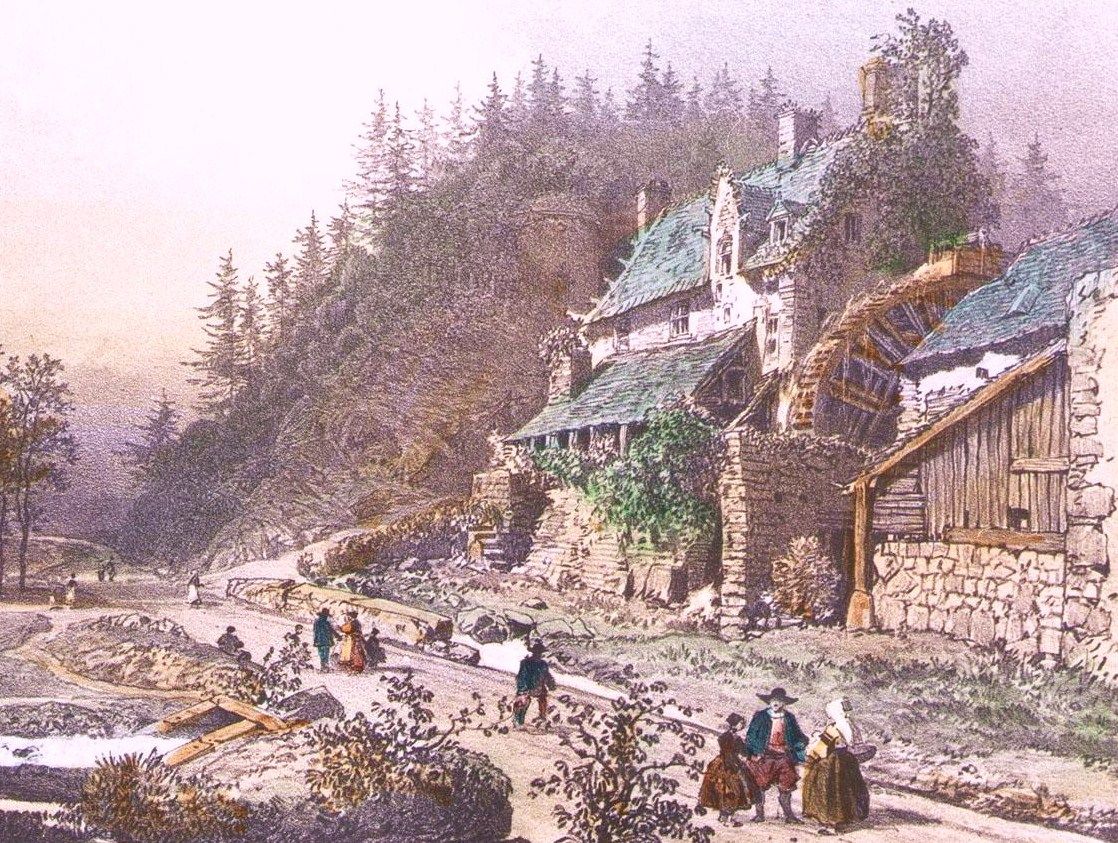 Plounéventer : le moulin de Brézal en 1868 (dessin de Félix Benoist)